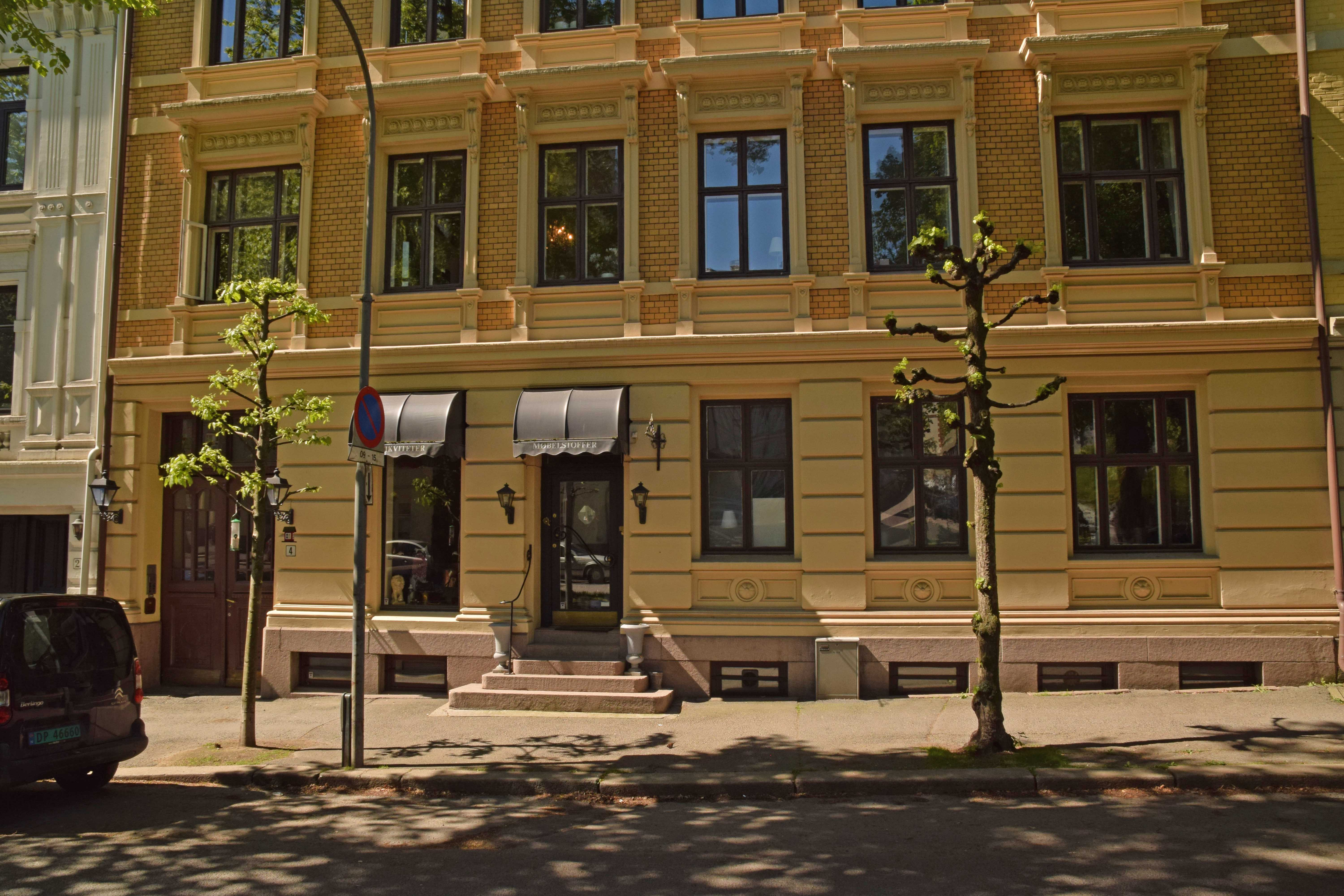 Leiegård, Gyldenløves gate 4, Frogner, arkitekt Carl Aaman, 1896.